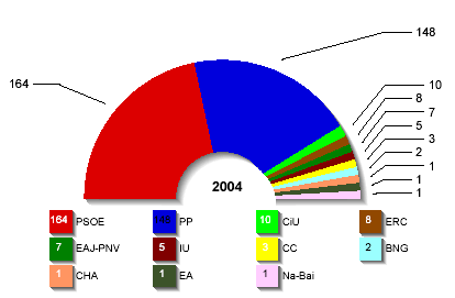 Grafik Ergebnis Parlamentswahlen zum Kongress Spanien 2004